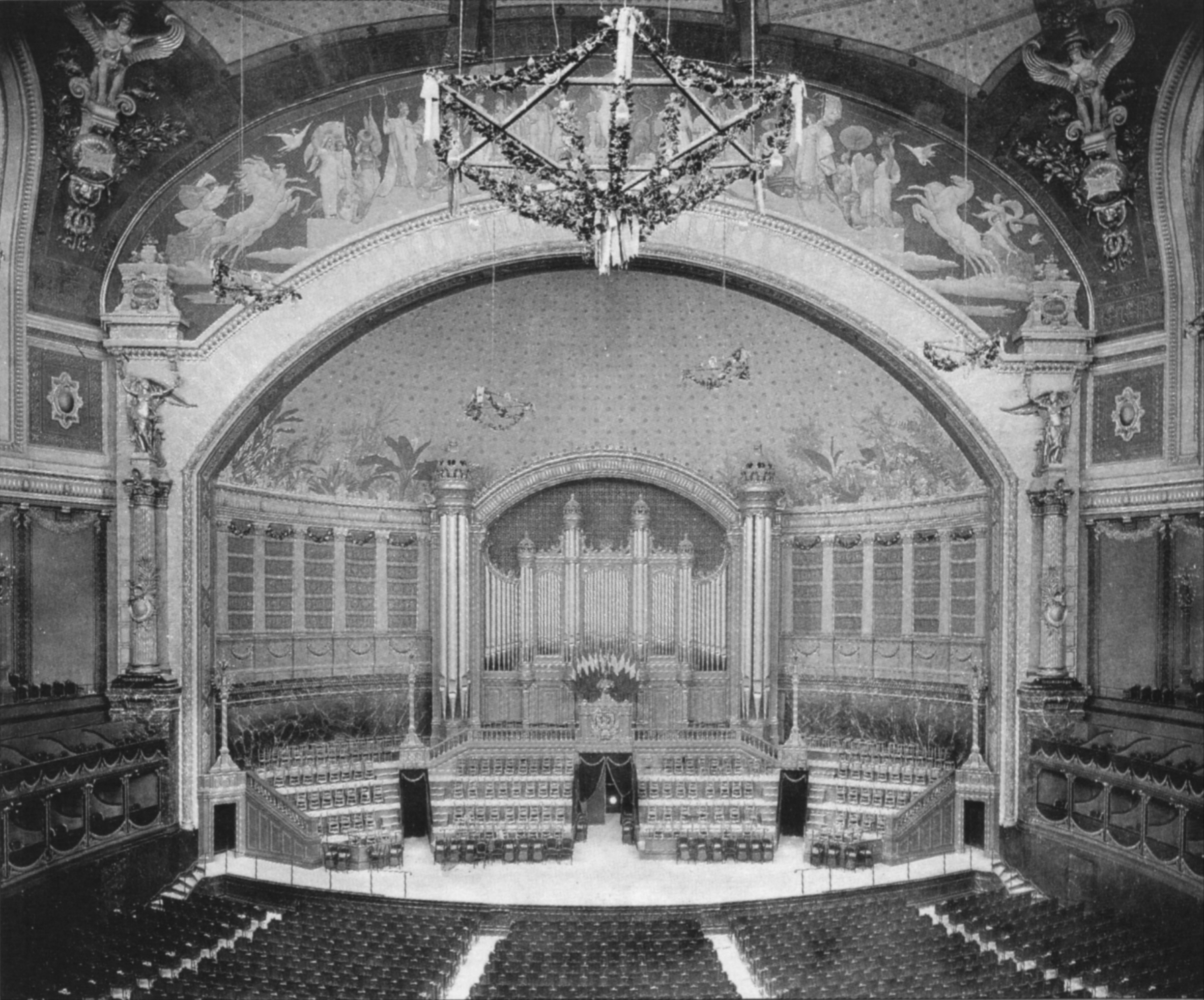 Le Palais du Trocadéro (architecte: Davioud), Grande Salle et Grand Orgue de Cavaillé-Coll. Vieille photo (collections Roger-Viollet).